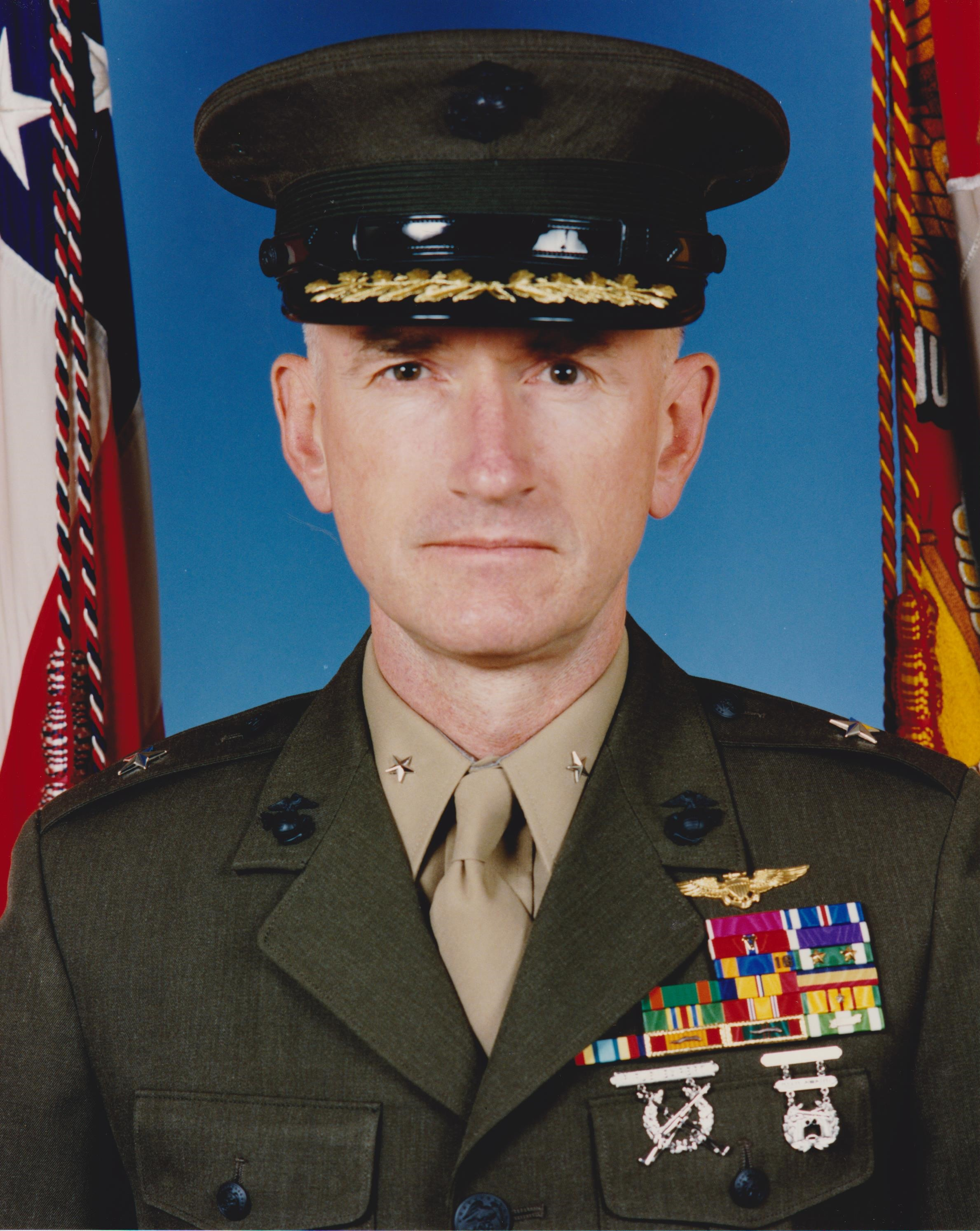 Brigadier General Gerald L. Miller from [1]